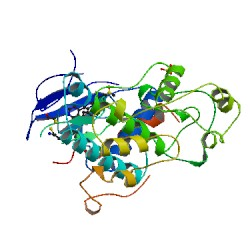 Protéine ERK-2 humain